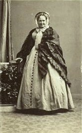 Княгиня Эмилия Петровна Трубецкая, ур. Витгенштейн (1801—1869)